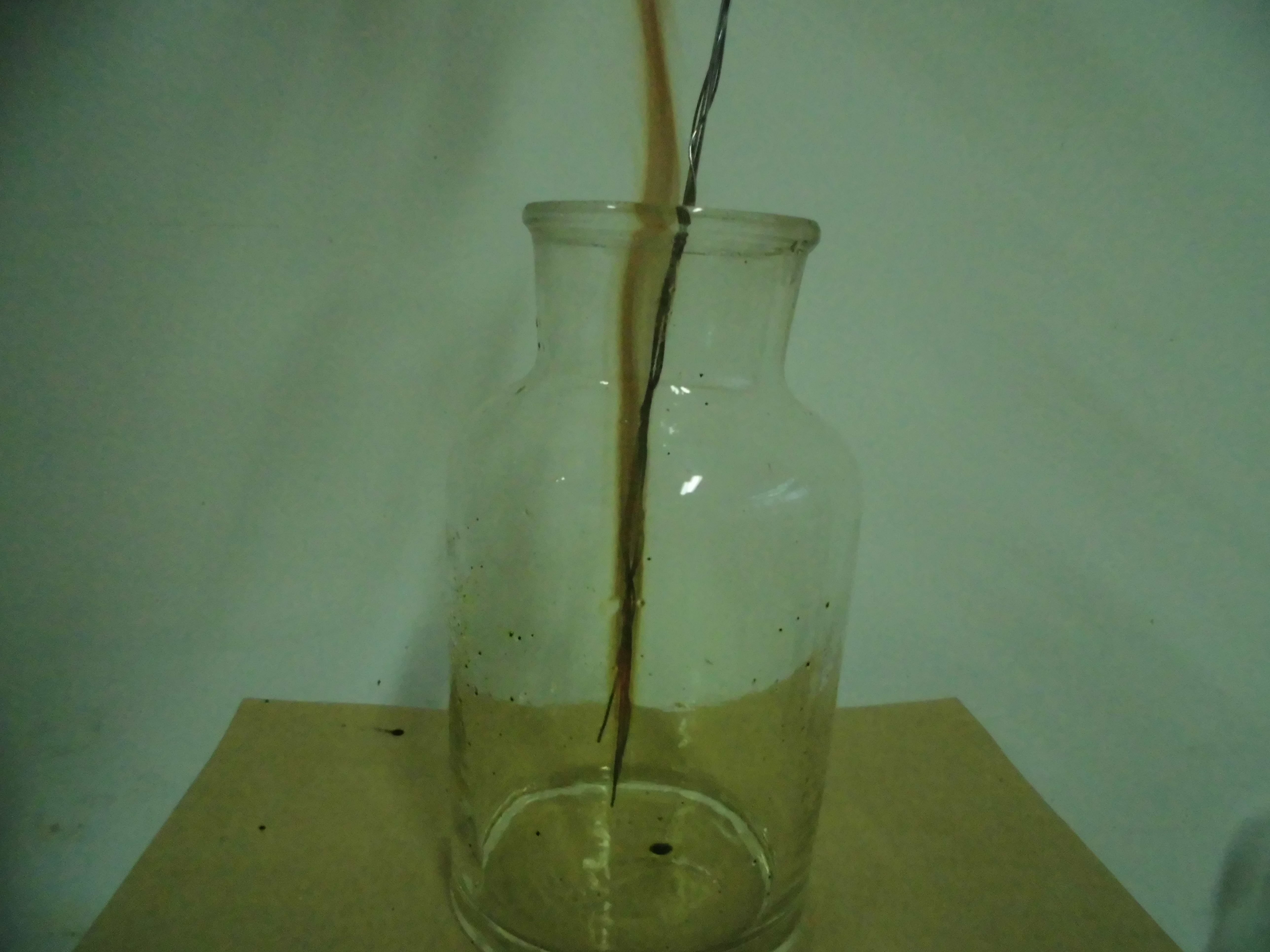 灼热的铁丝接触氯气，立刻反应，产生氯化铁(III)。